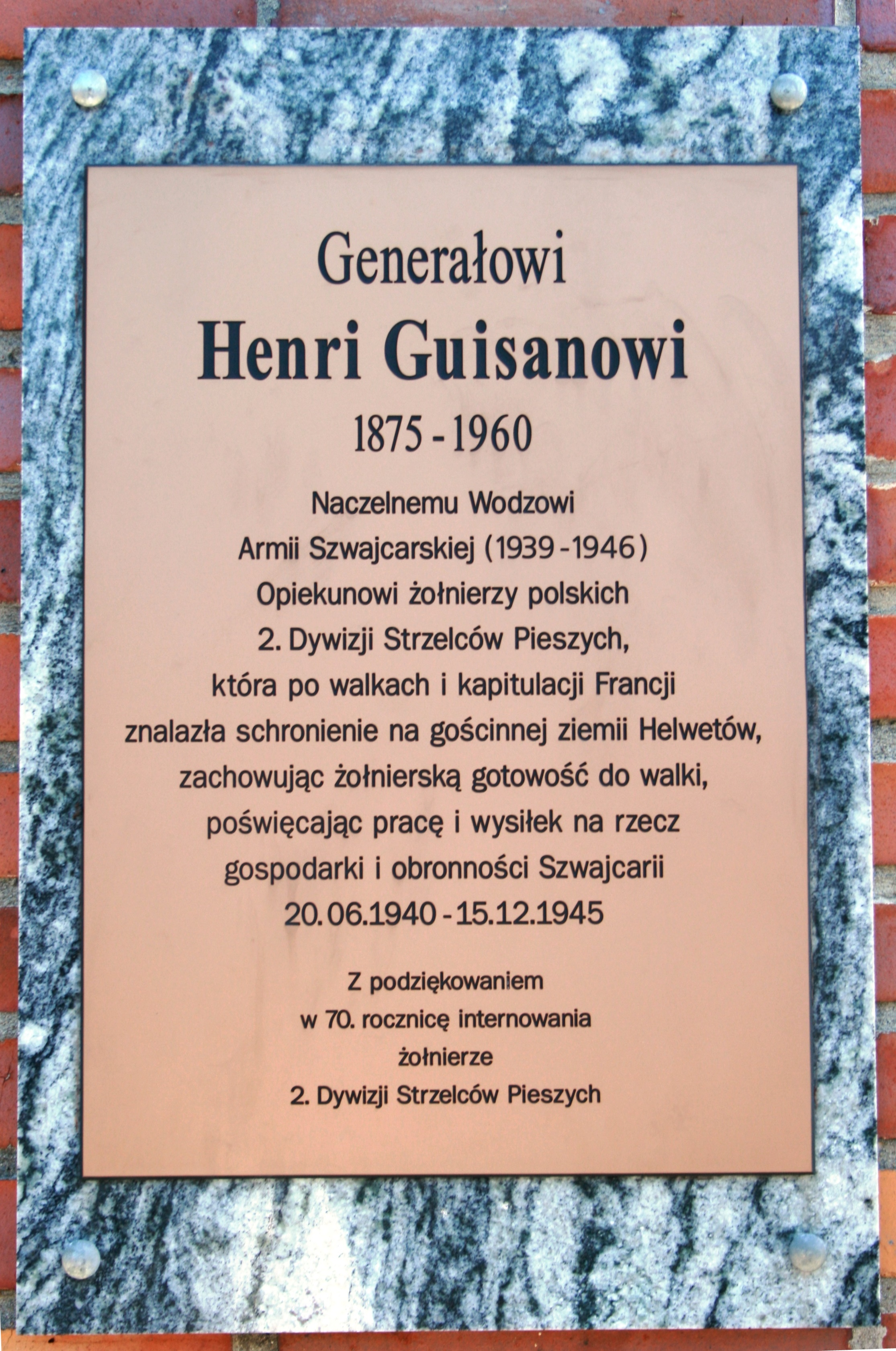 Kwatera Pierwszej Samodzielnej Brygady Spadochronowej na Powązkach Wojskowych w Warszawie